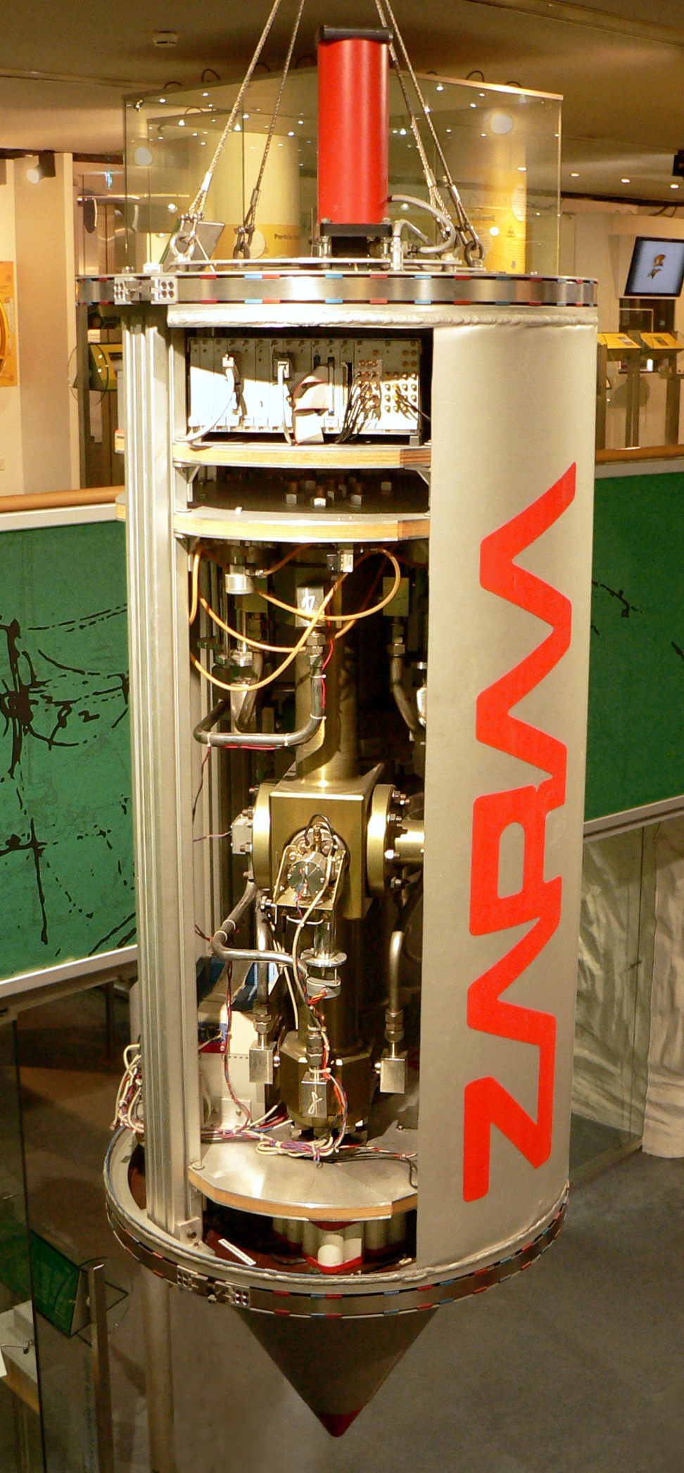 Fallkapsel des Zentrums für angewandte Raumfahrttechnologie und Mikrogravitation (ZARM), Baujahr 1990, im Deutschen Museum Bonn